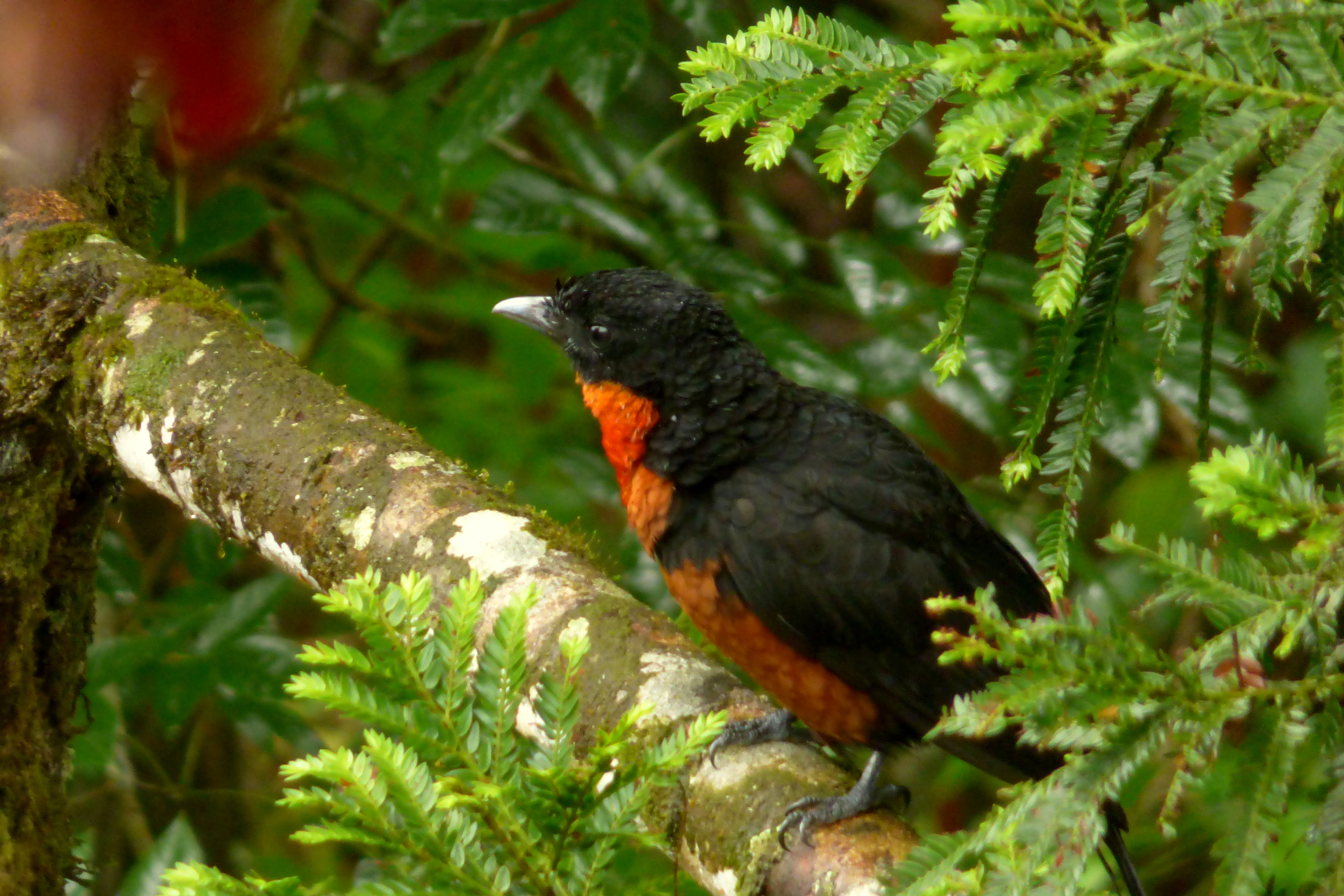 Pyroderus scutatus (Toropisco)